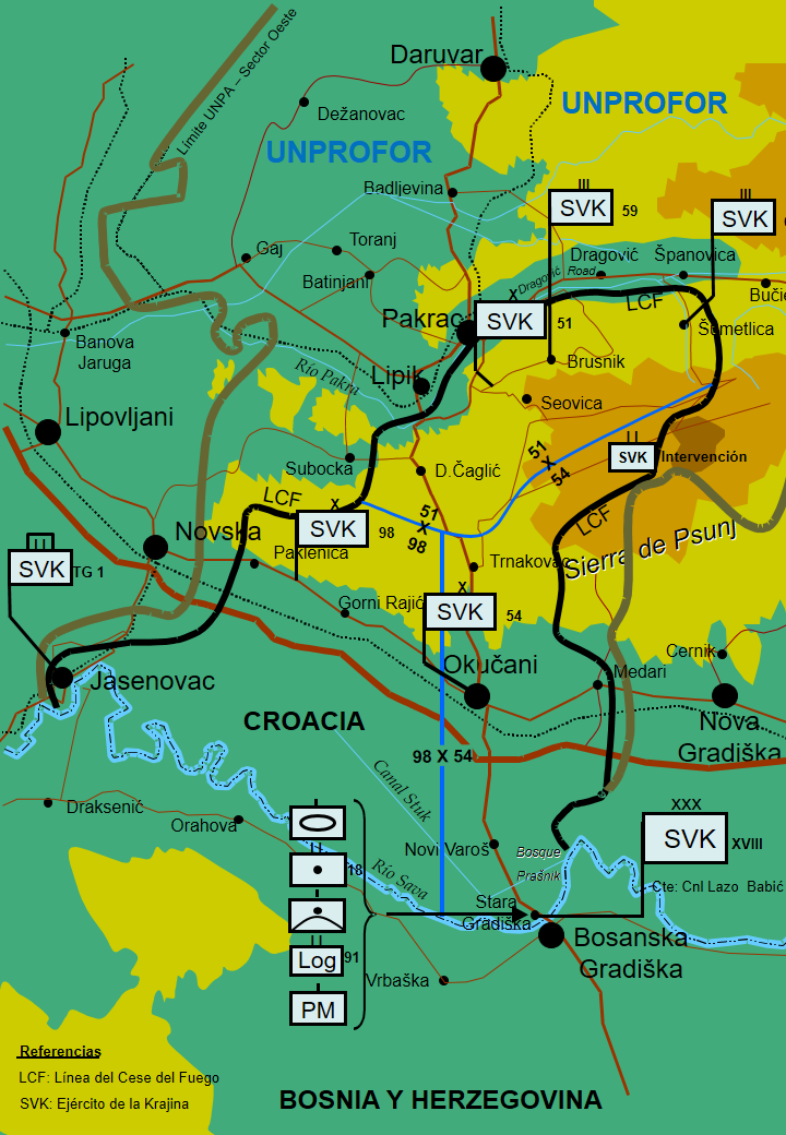 Elaborado sobre la base de: Brigović, Ivan; Martinić Jerčić, Natko; Radoš, Ivan (2015). «Vojno Redarstvena Operacija Bljesak». Hrvatski memorijalno-dokumentacijski centar Domovinskog rata (en inglés) (Zagreb). Consultado el 01 de septiembre de 2018. Republic of Serbian Krajina. Main Staff of the Serbian Army (13-07-1995). Report of the Commission Charged with Establishing Responsibility of the Organization for the Fall of Western Slavonia (en inglés). Documento ICTY 0281-1094-0281-1105-EDt.doc/zv. Knin. State Fact Findings Commision on the causes and the manner of the causes of the fall of Western Slavonia (11 de julio de 1995). Report on the causes of the fall of Western Slavonia (en ingles). Documento ICTY 0326-6252-0326-6273/uj. Knin.